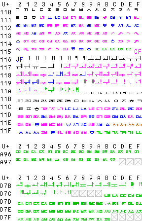 유니코드 5.2 한글 자모.